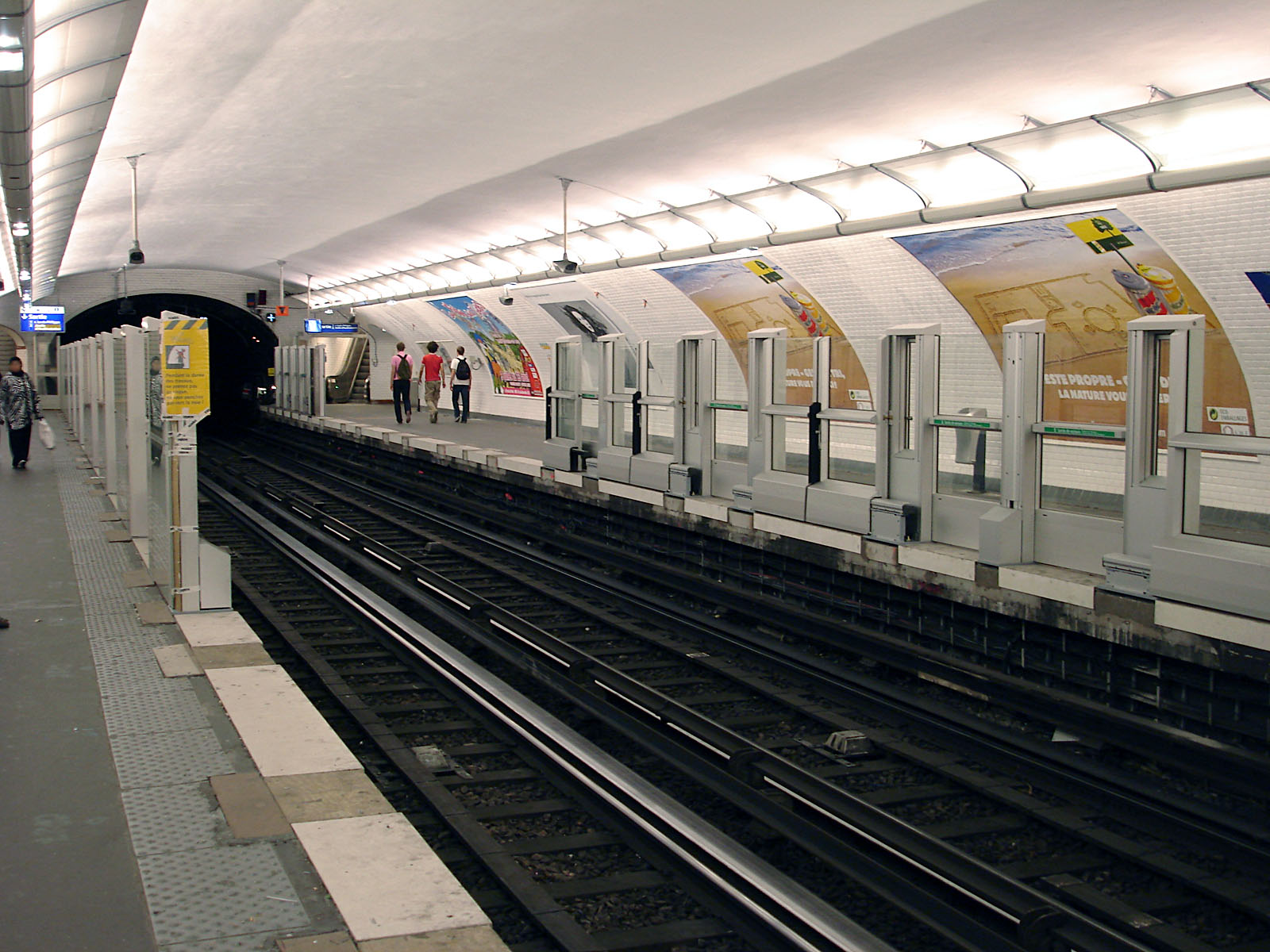 La station Les Sablons de la ligne 1 du métro de Paris, France. Travaux de pose des portes palières.